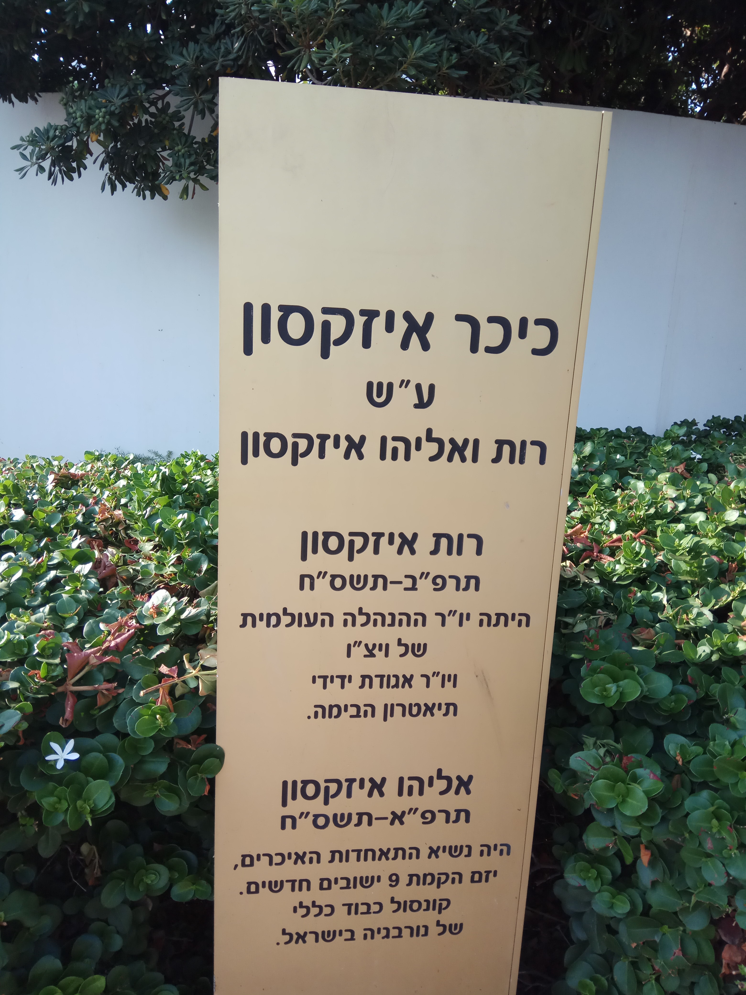 כיכר איזקסון בהרצליה